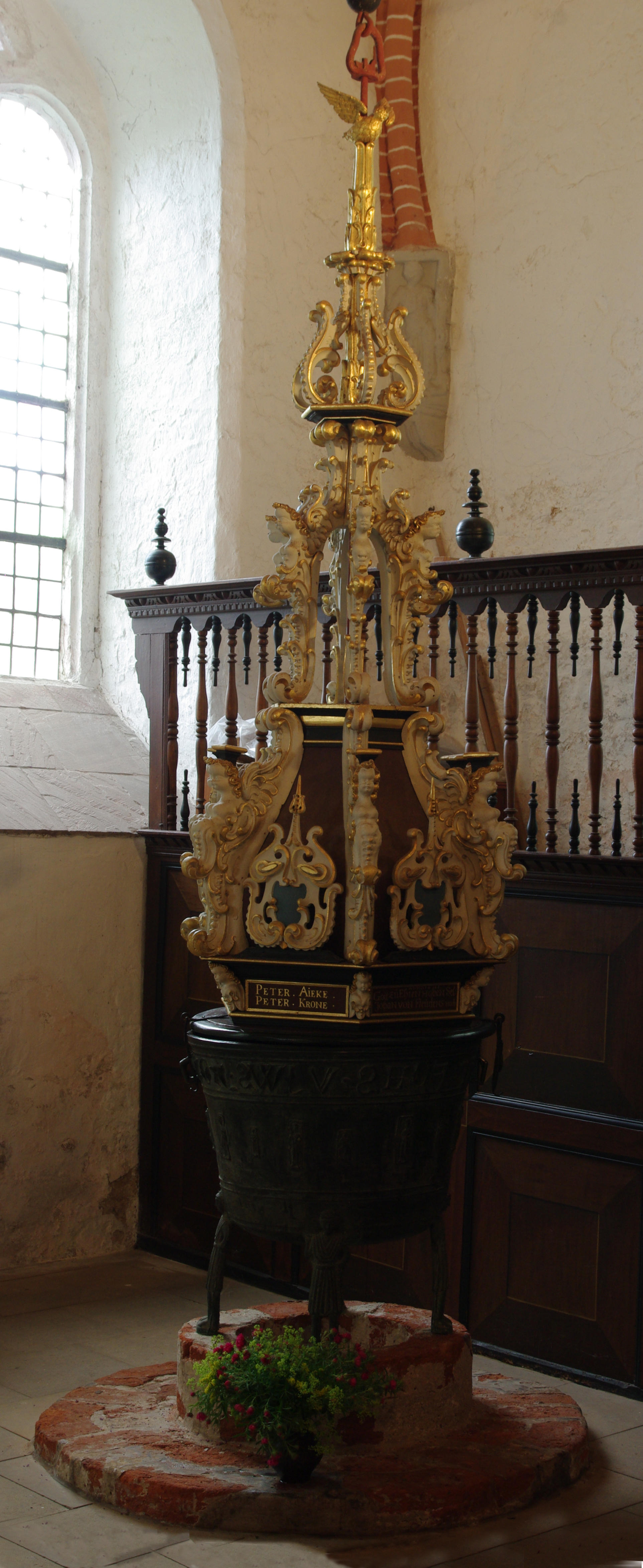 Der Taufkessel mit Abdeckung